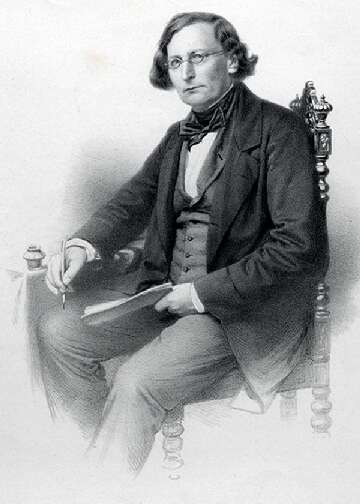 Portrait Friedrich Georg Wieck